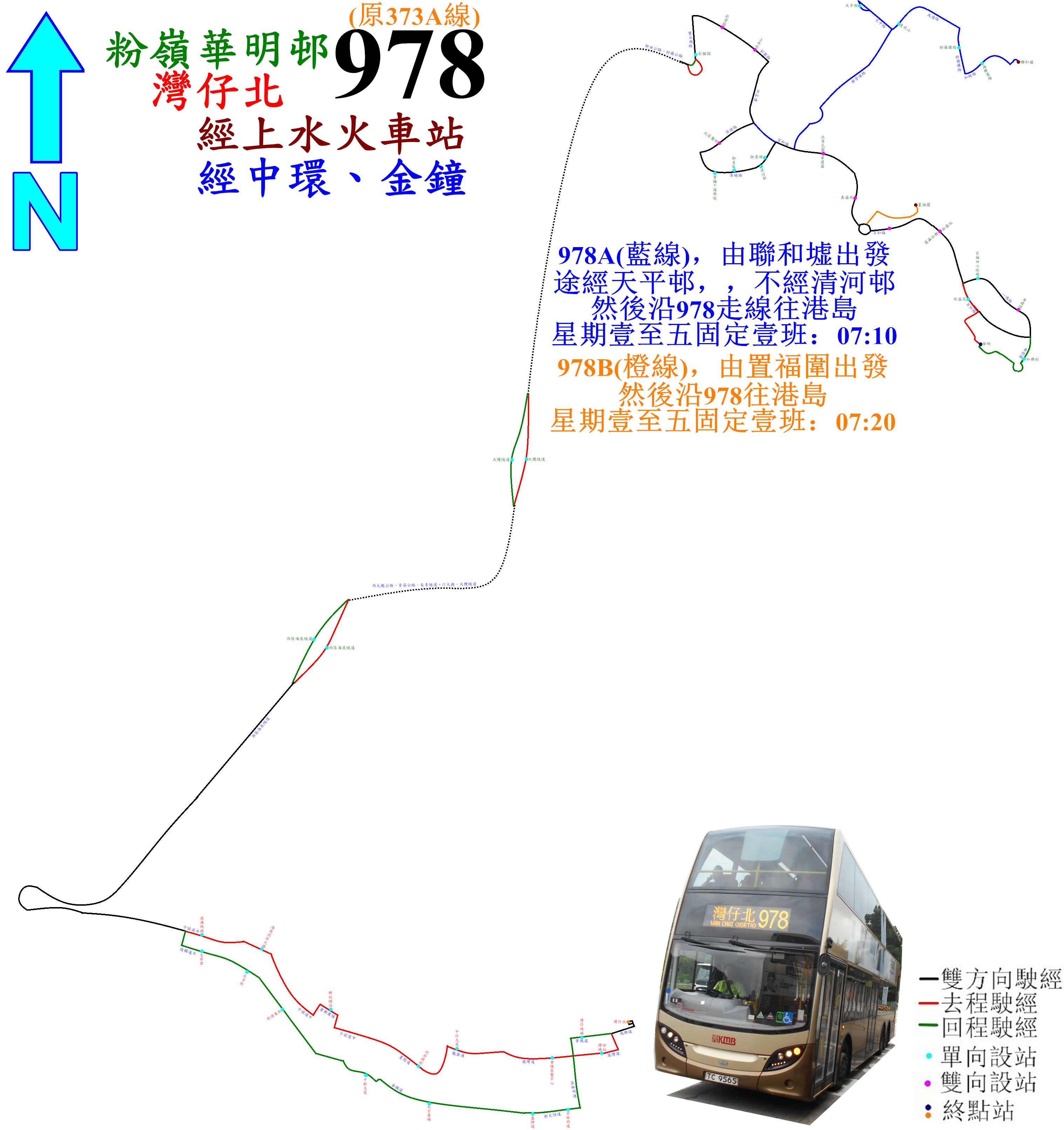 中文（香港）: 過海隧巴373A線的走線圖